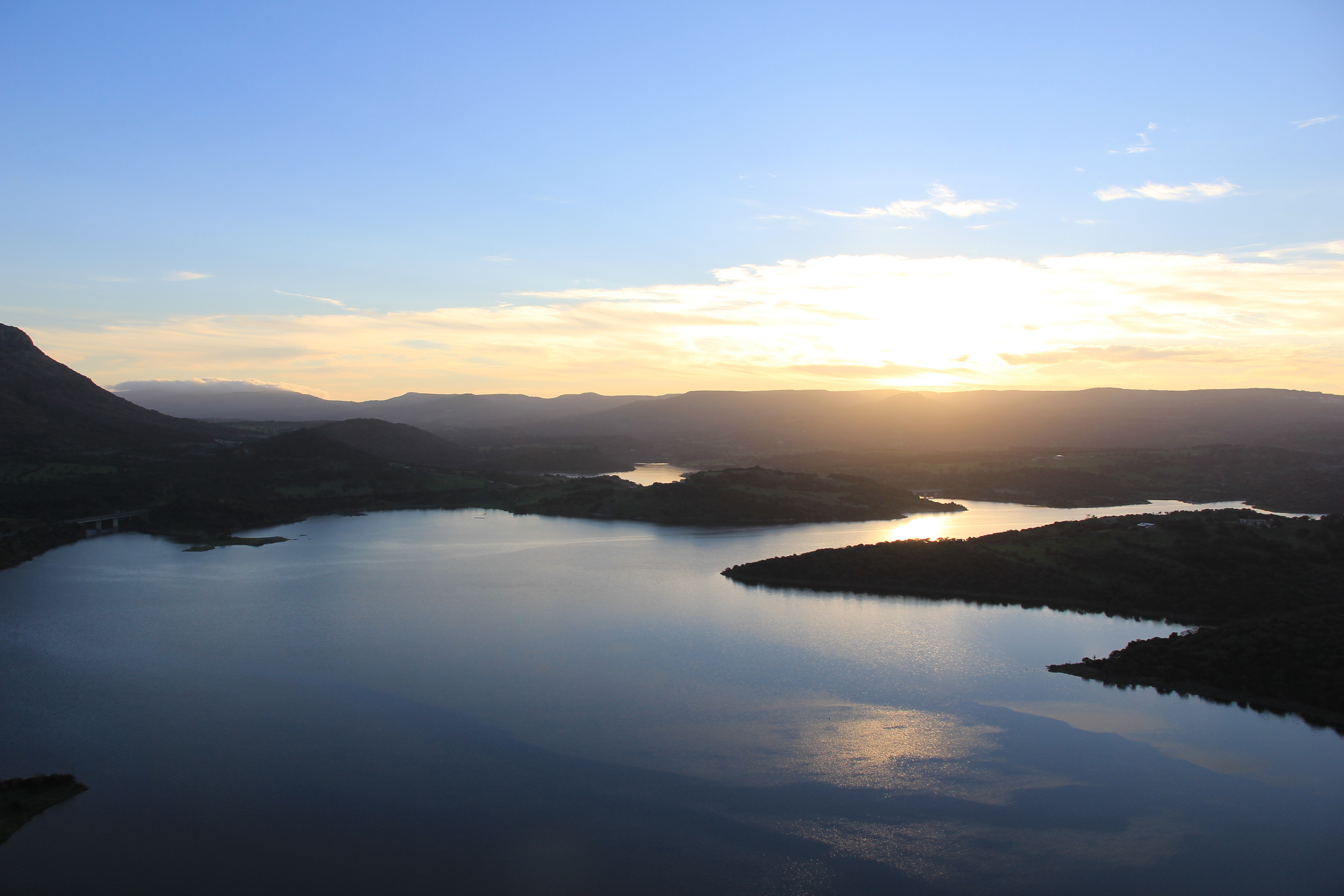 Monteleone Rocca Doria - Lago dell'Alto Temo